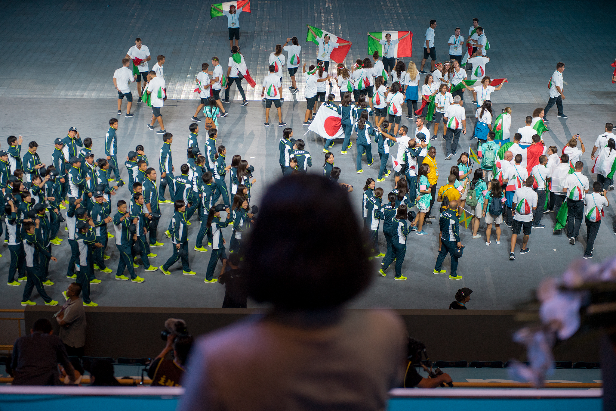 08.19 總統出席2017年世界大學運動會開幕典禮